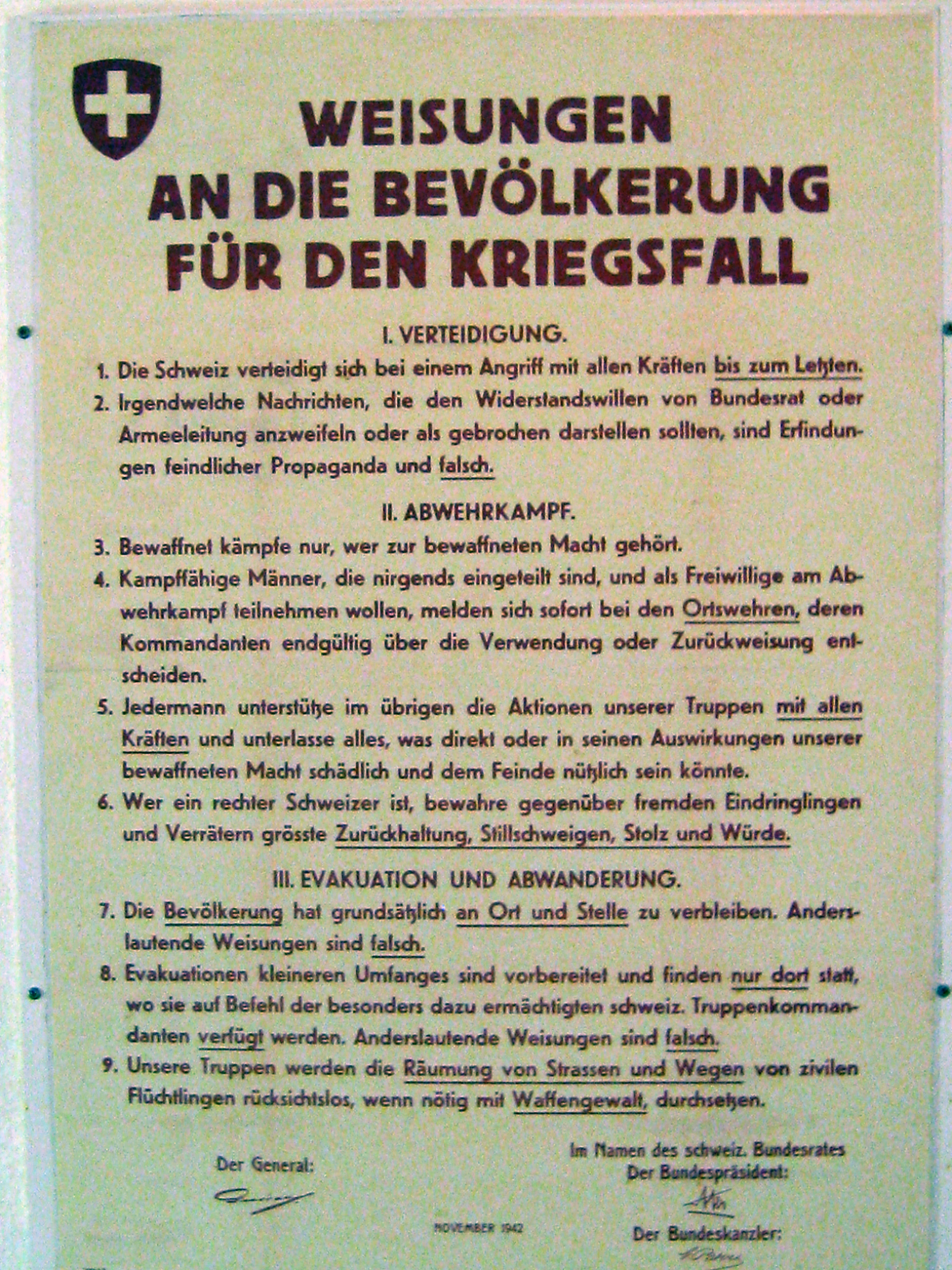 Weisungen an die Schweizer Bevölkerung für den Kriegsfall, fotografiert im Festungsmuseum Reuenthal